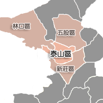 泰山區相對位置。